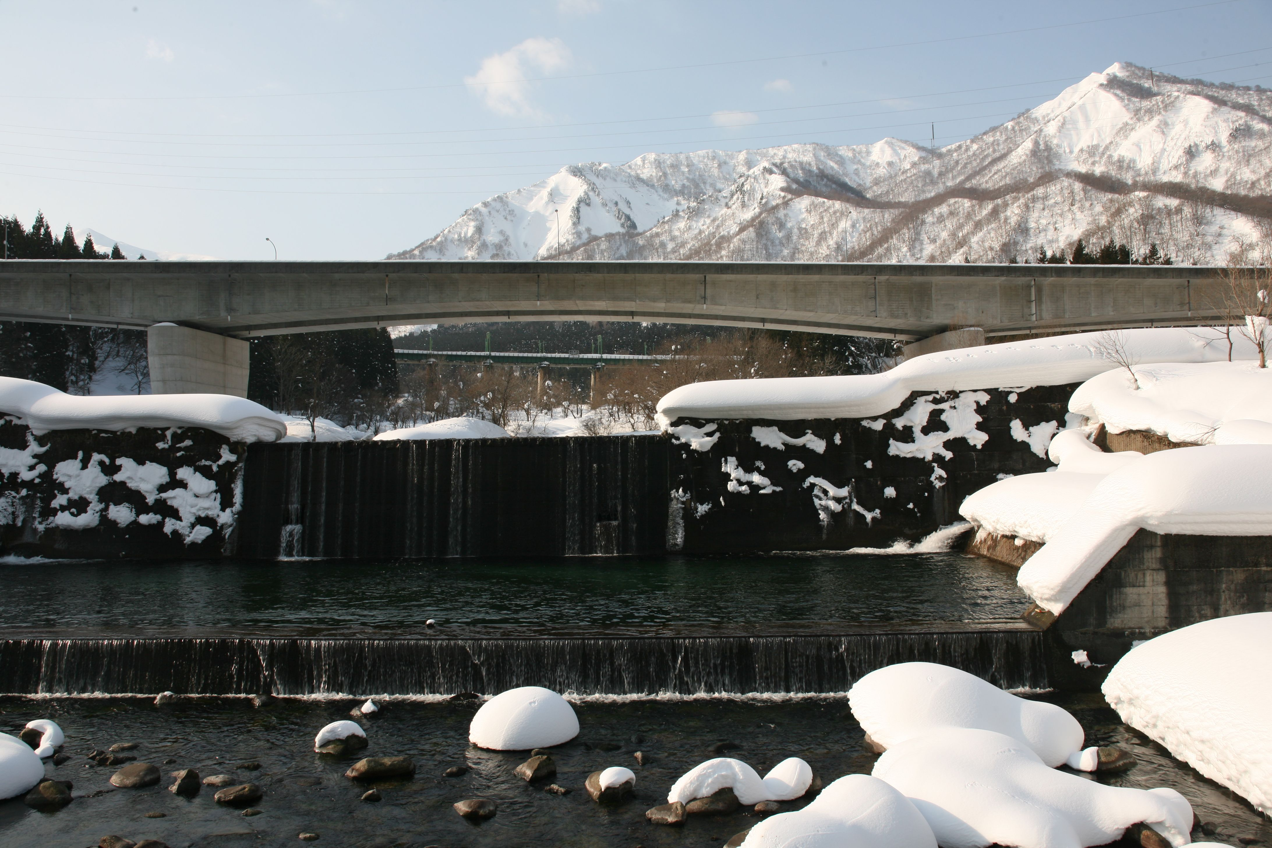 土樽駅付近の風景